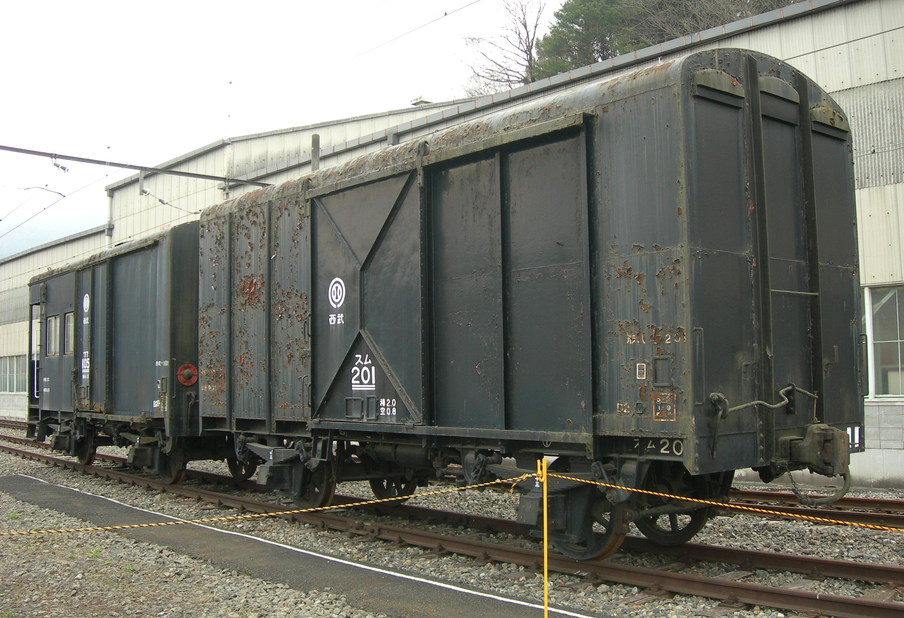 ワフ101形ワフ105 スム201形スム201